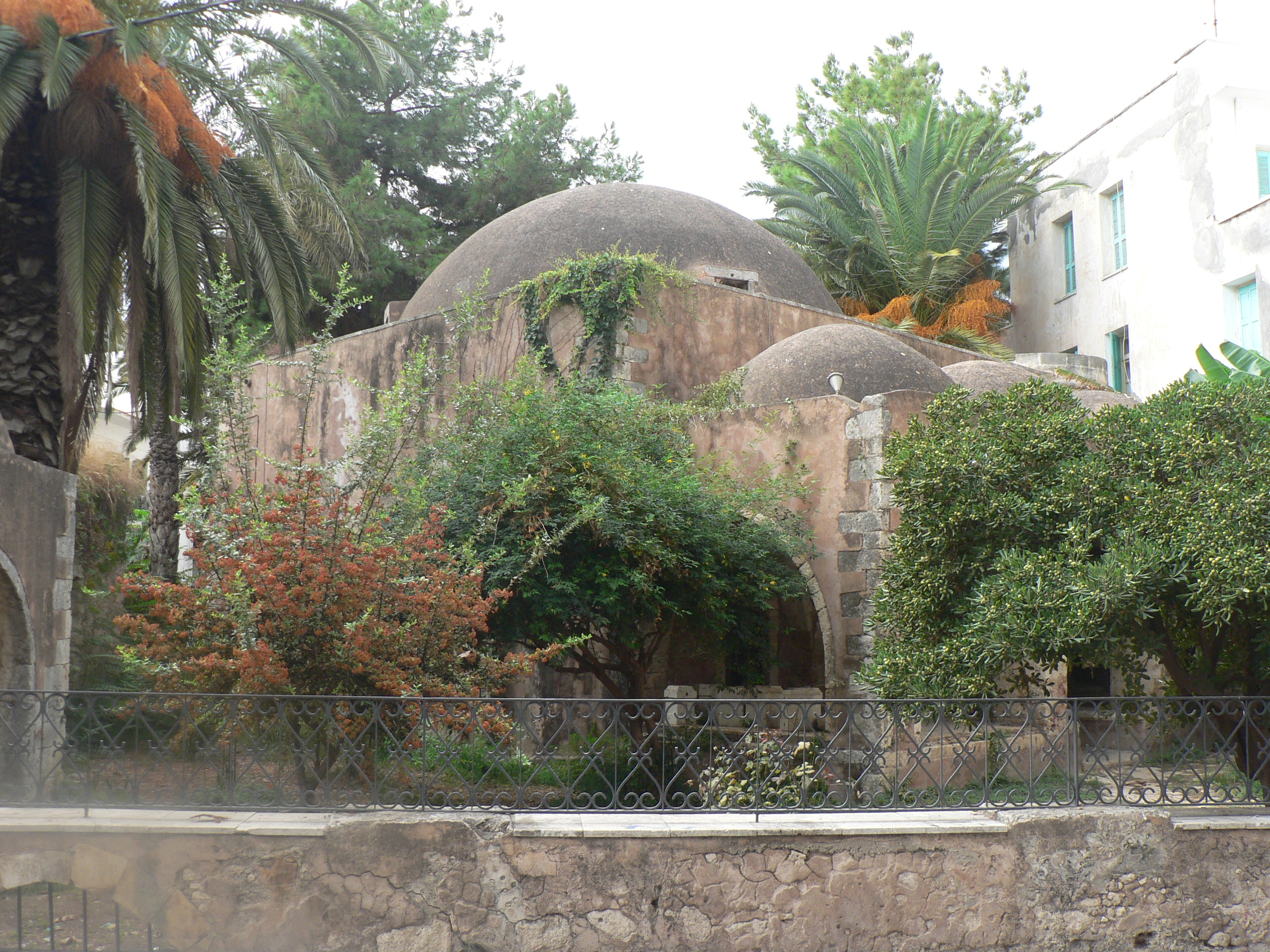 Kara Pasha Mosque, Rethymno, Crete.